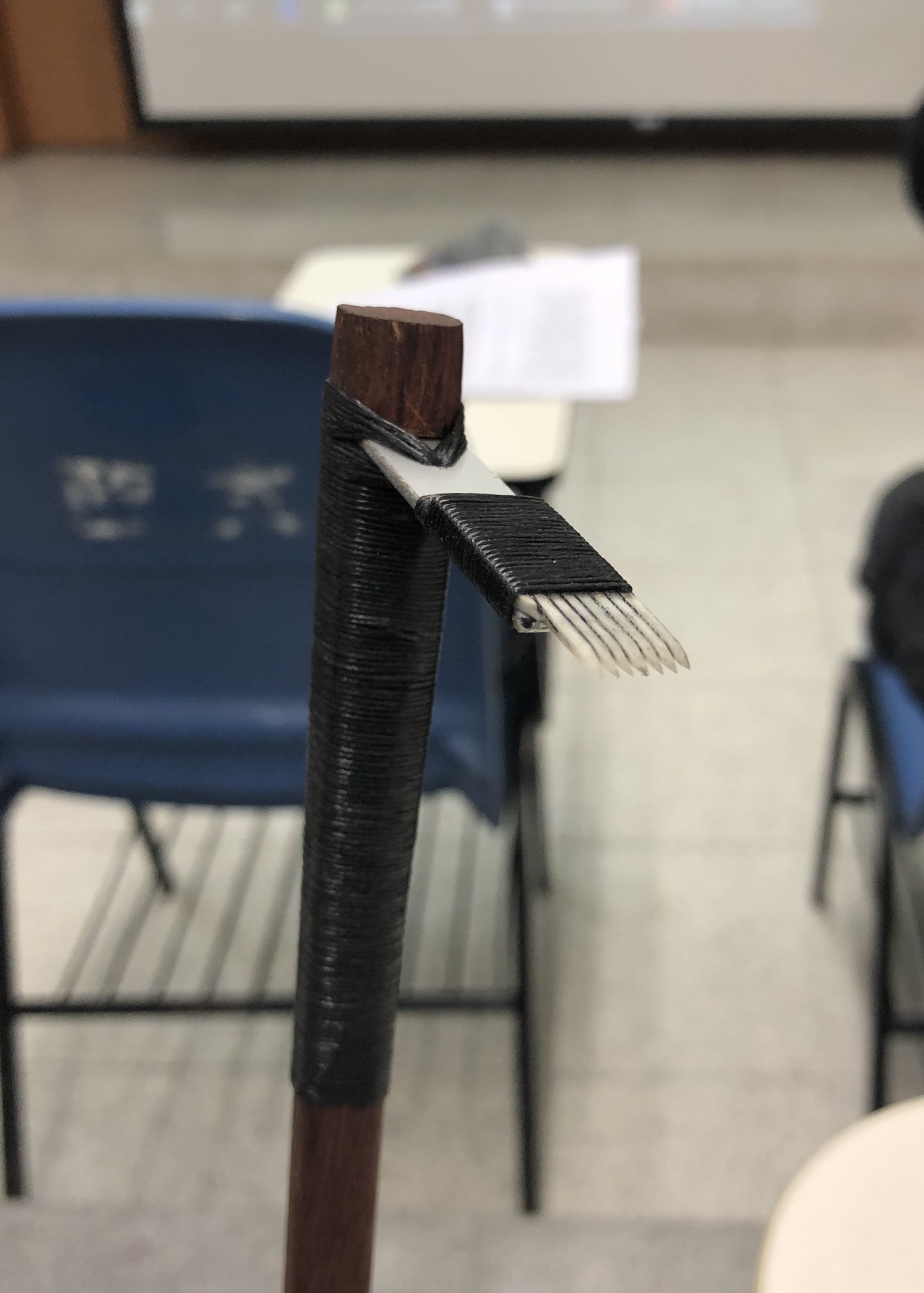 傳統拍刺使用的拍針